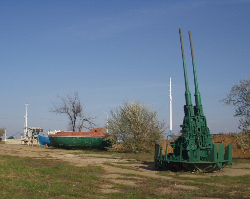 Зенитное орудие калибра 57 мм СМ-24-ЗИФ в музее «Военная горка», г. Темрюк.